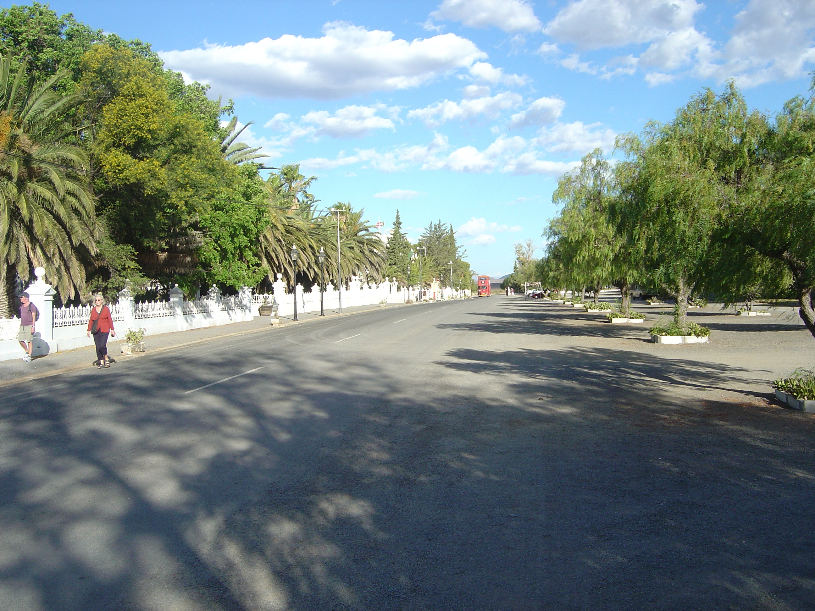 Road in Matjiesfontein